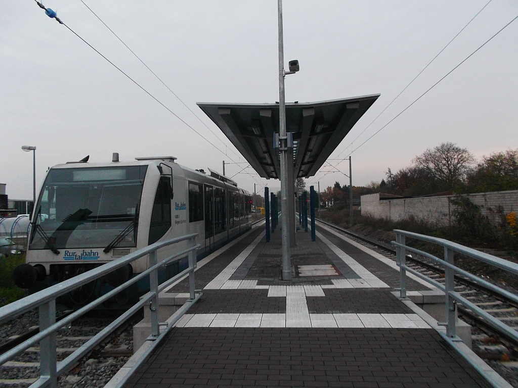 Der neue Bahnhof in Heinsberg kurz vor der Eröffnung im Dezember 2013.